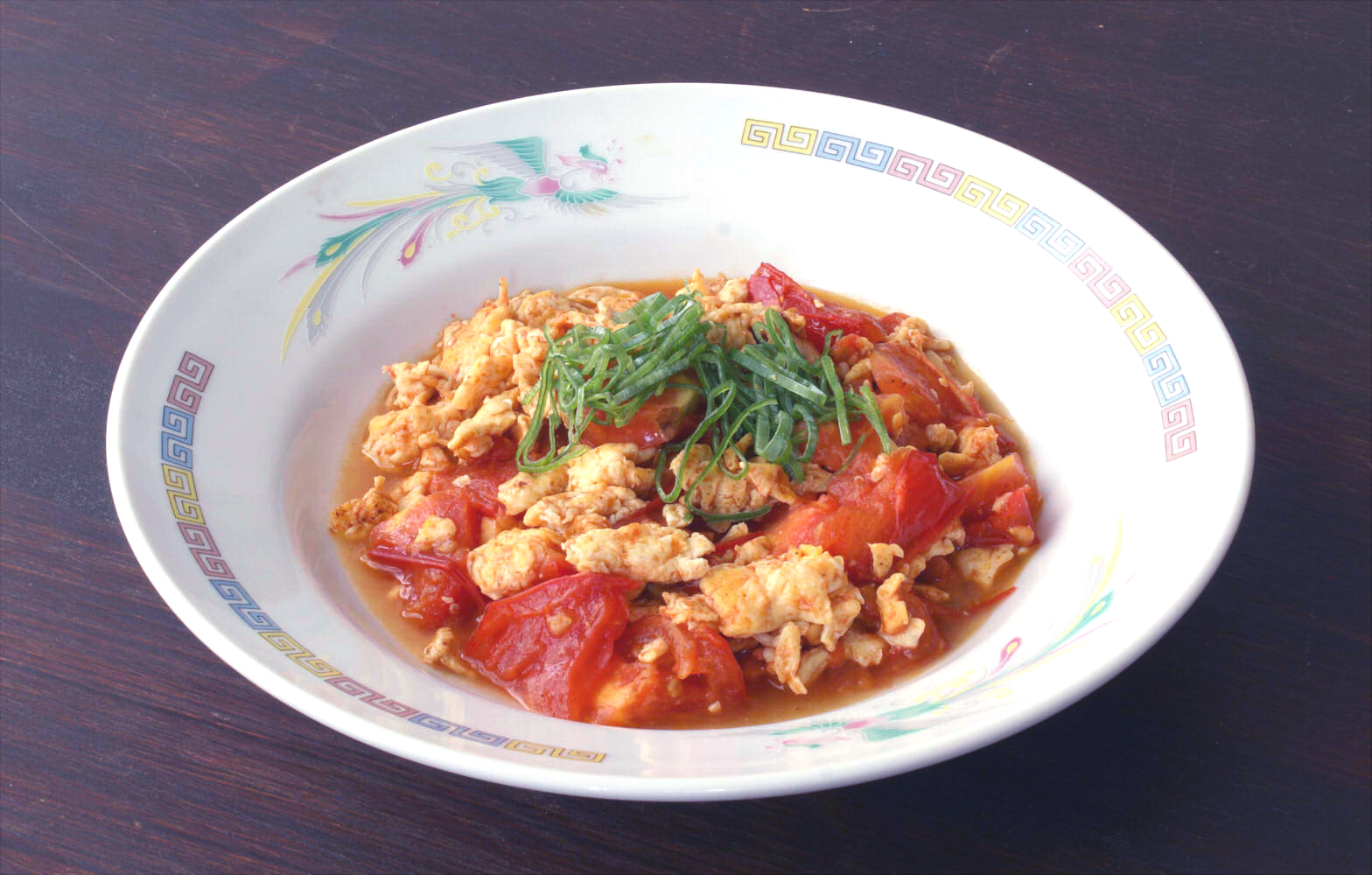 番茄炒蛋画像